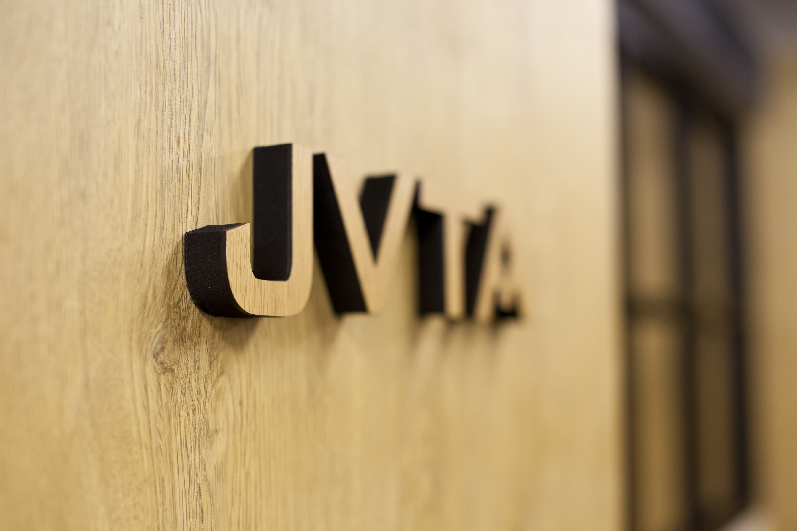 JVTA（3Ｆ）